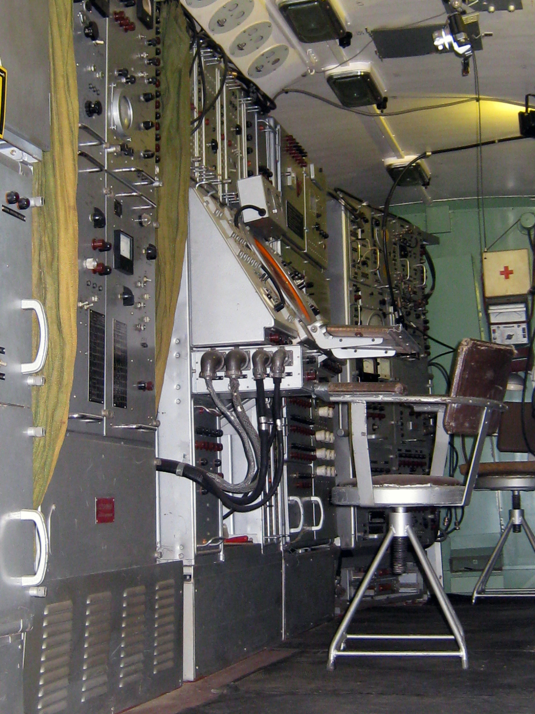 DDR-Radarstation P-18 im Militärmuseum Full